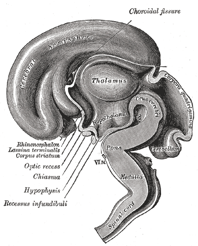 Median sagittal section of brain of human embryo of three months. Dibujo semi-esquemático de un corte sagital de encéfalo. Se han retirado los lóbulos de la corteza cerebral. Se observan los Núcleos basales, Tálamo e Hipotálamo.